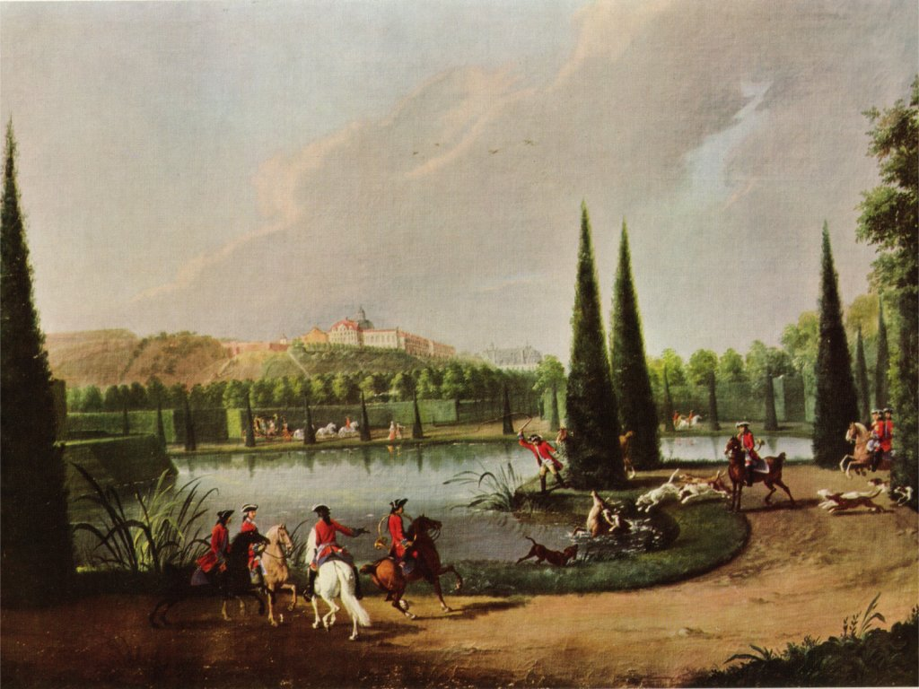 Hirschhatz in der Karlsaue (Kassel). Johann Heinrich Tischbein der Ältere, 1722-1789; Öl auf Leinwand Schloß Fasanerie bei Fulda